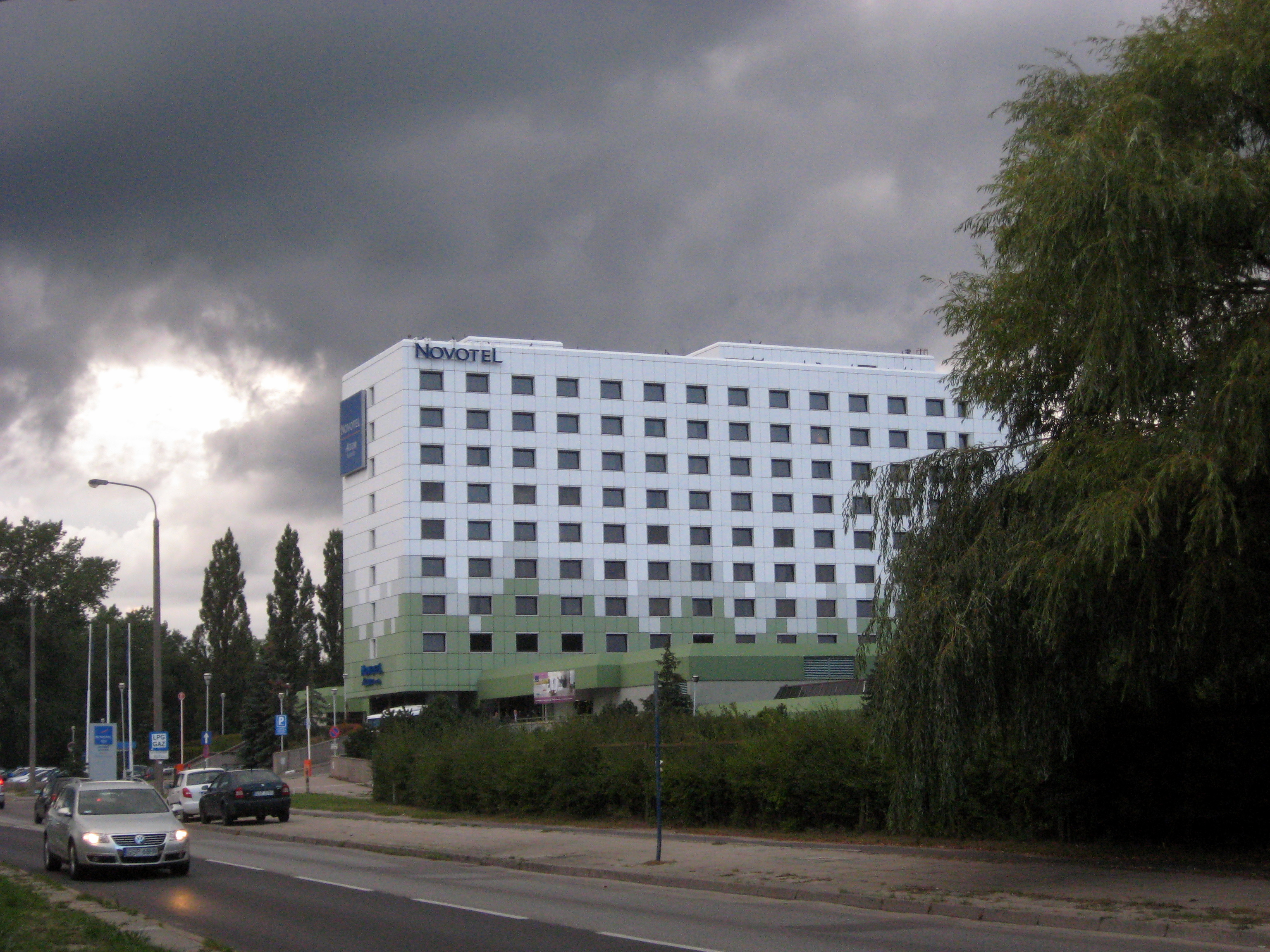 Hotel NOVOTEL w Gdańsku Jelitkowie w pobliżu granicy z Sopotem